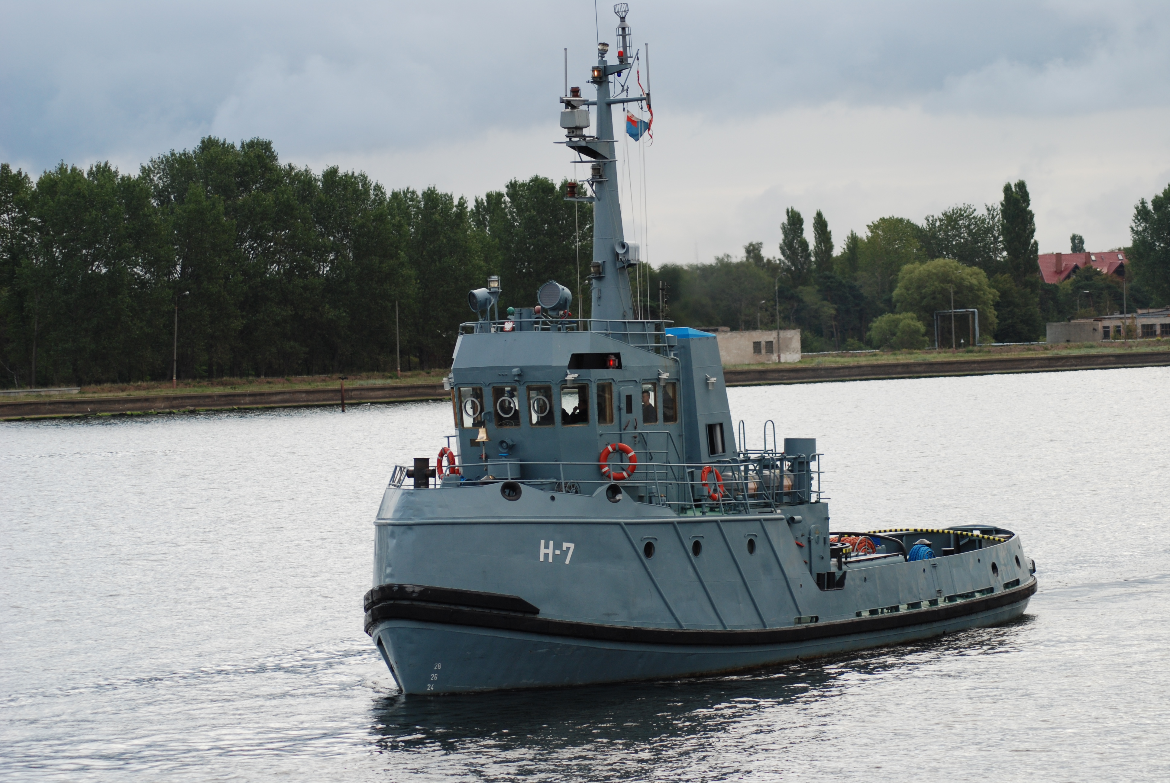 Zdjęcie wykonane na Helu Holownika H-7.